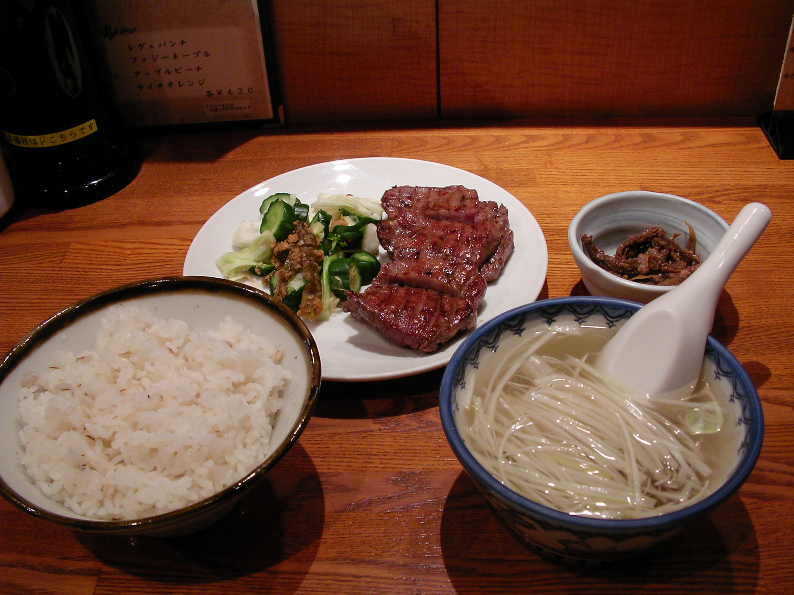 Sedai gyutantei 200607 利久の牛タン定食 むぎめしとテールスープとつけもの と牛佃煮